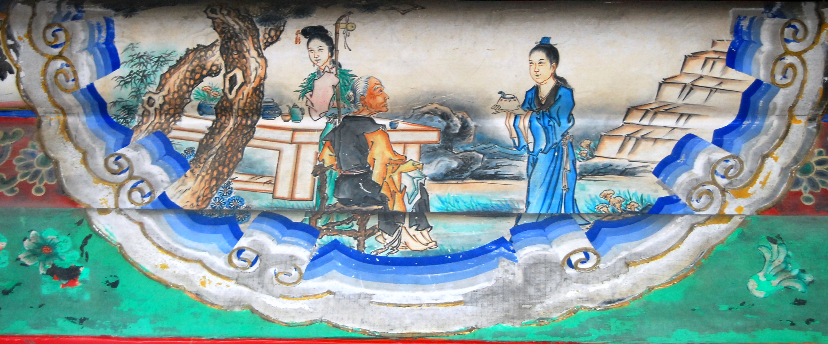 颐和园长廊上的彩绘：蓝桥捣药